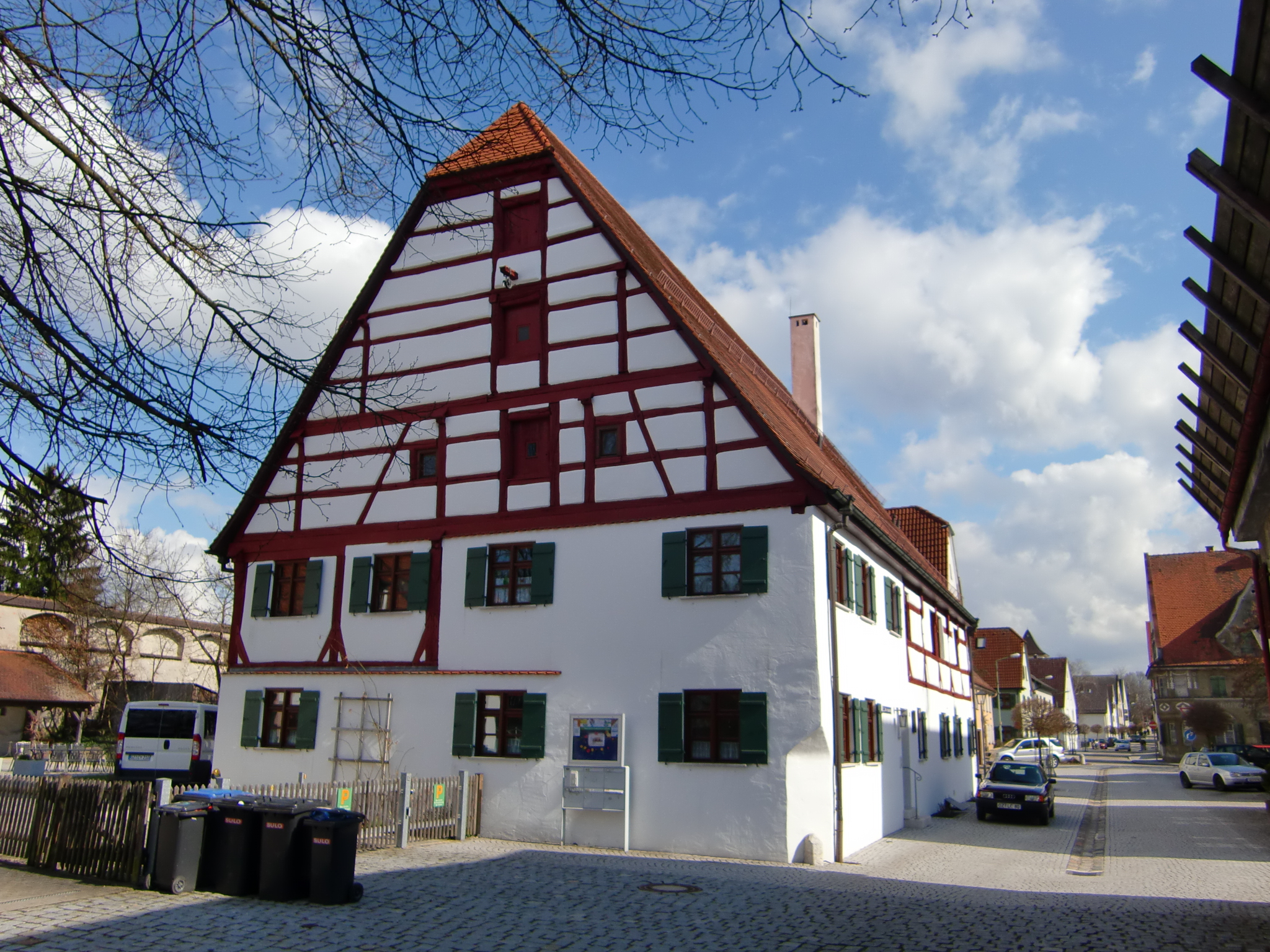 Ehem. Farrenstall, jetzt Wohnhaus, Fachwerkobergeschoß, Krüppelwalmdach, im Kern 1. Viertel 16.Jahrhundert; zugehöriges Teilstück der Stadtmauer, 14. /15. JahrhundertThis is a photograph of an architectural monument.